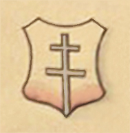 Zelg-Wappen mit Patriarchenkreuz des städtischen Spitals (ehemals Heilig-Geist-Spital) auf der Markgröninger Aussfeldkarte von 1752